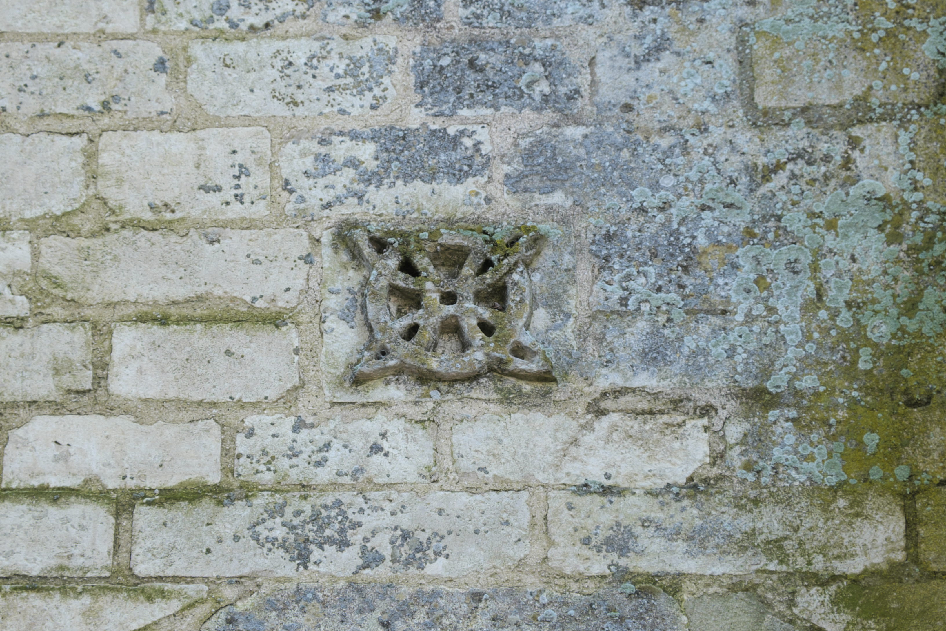 Katholische Kirche Notre-Dame-des-Anges in Angles im Département Vendée (Pays de la Loire/Frankreich), Rosette